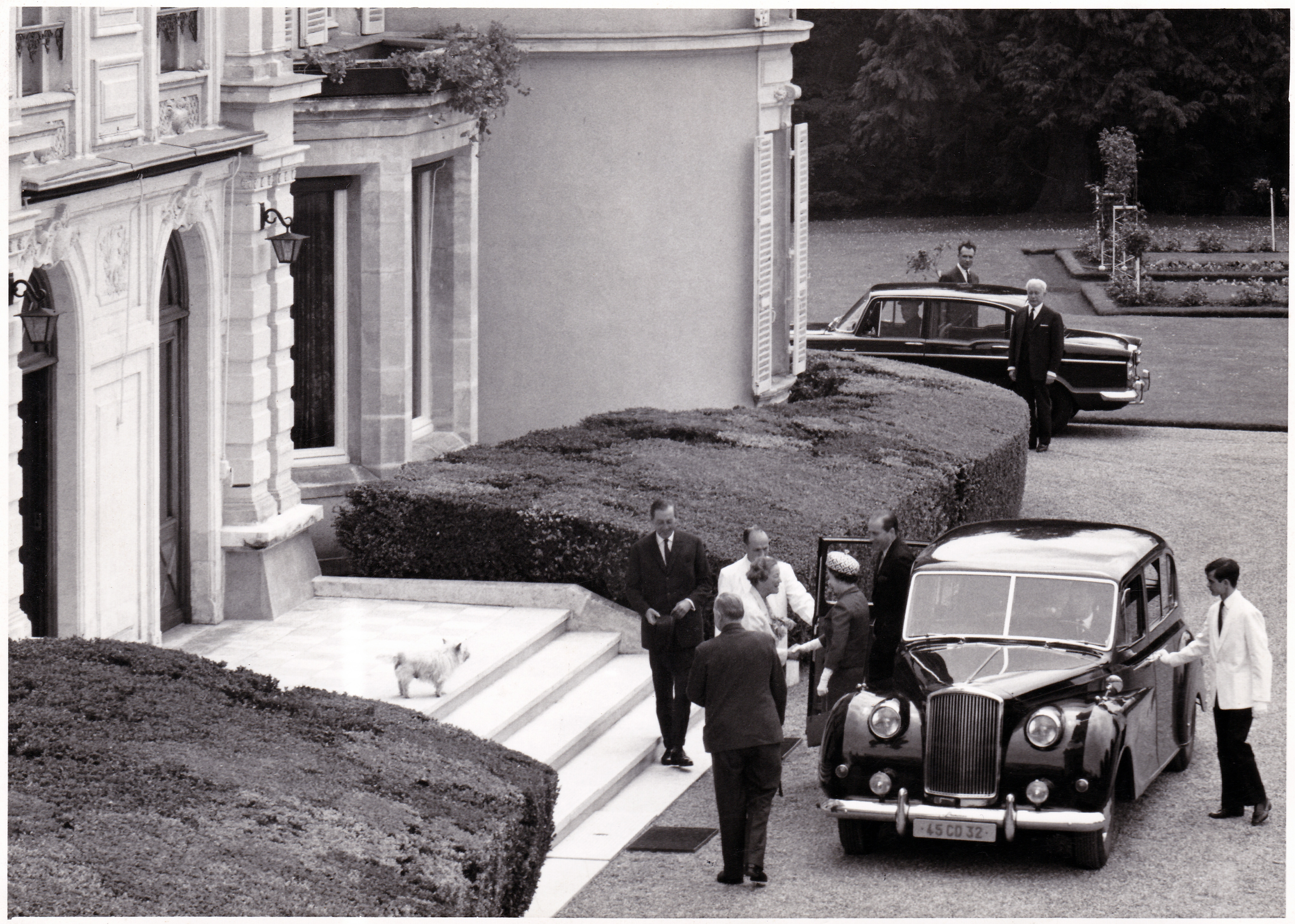 Photo prise en 1967 à Savigné L'Evêque, au Chateau du Mesnil, Sarthe. Réception de la reine d'Angleterre Elisabeth II par Mme Elisabeth Couturié.